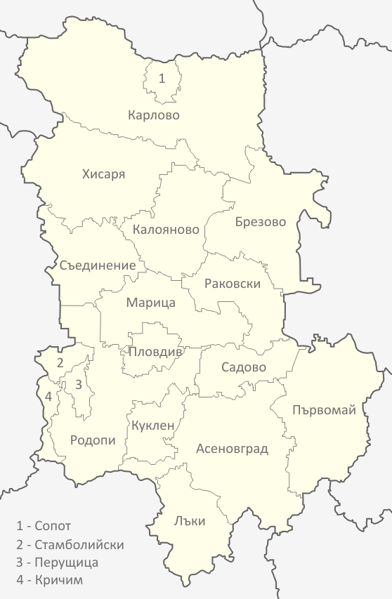 Картата е създадена от Любомир Таушанов